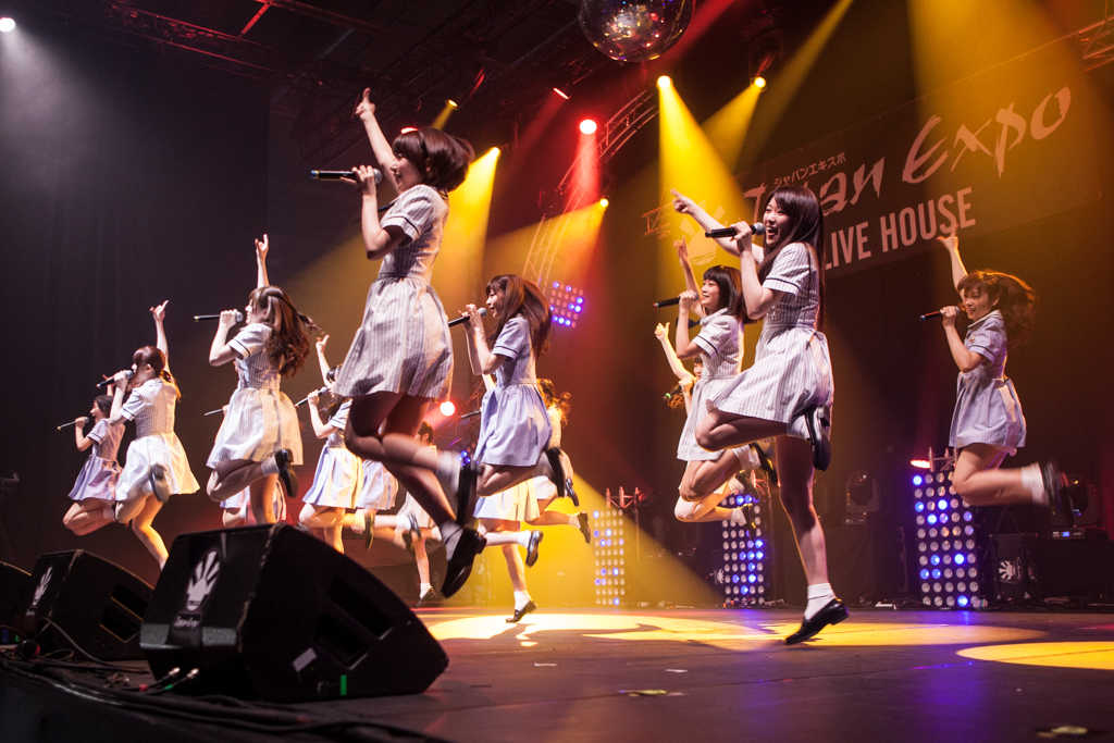 Nogizaka46